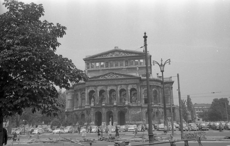 Stadtaufnahmen in Frankfurt/Main Oper